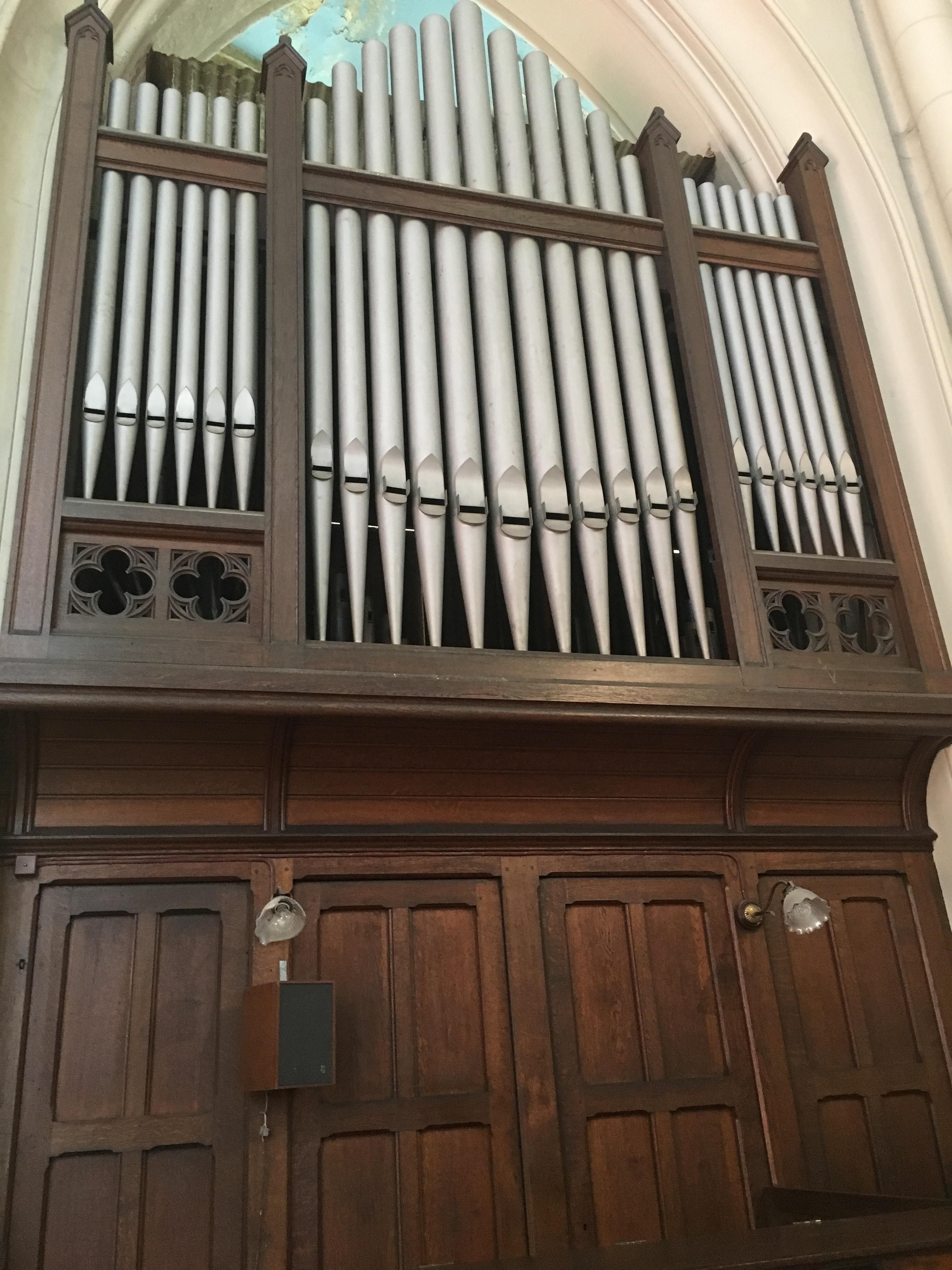 Chiesa di Nostra Signora di Laeken